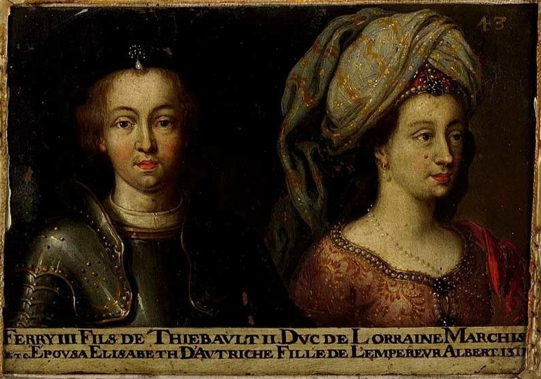 Portrait de Ferry IV, duc de Lorraine de 1312 à 1328, et de son épouse Elisabeth d'Autriche. Ce tableau fait partie d'une suite d'une soixantaine de double-portraits représentant les ducs et duchesses de Lorraine ainsi que leurs ancêtres supposés. Ferry Ier de Bitche n'étant pas représenté dans cette généalogie, la numérotation est modifiée. Musée des Offices, Florence (Inv. 1890, 636)